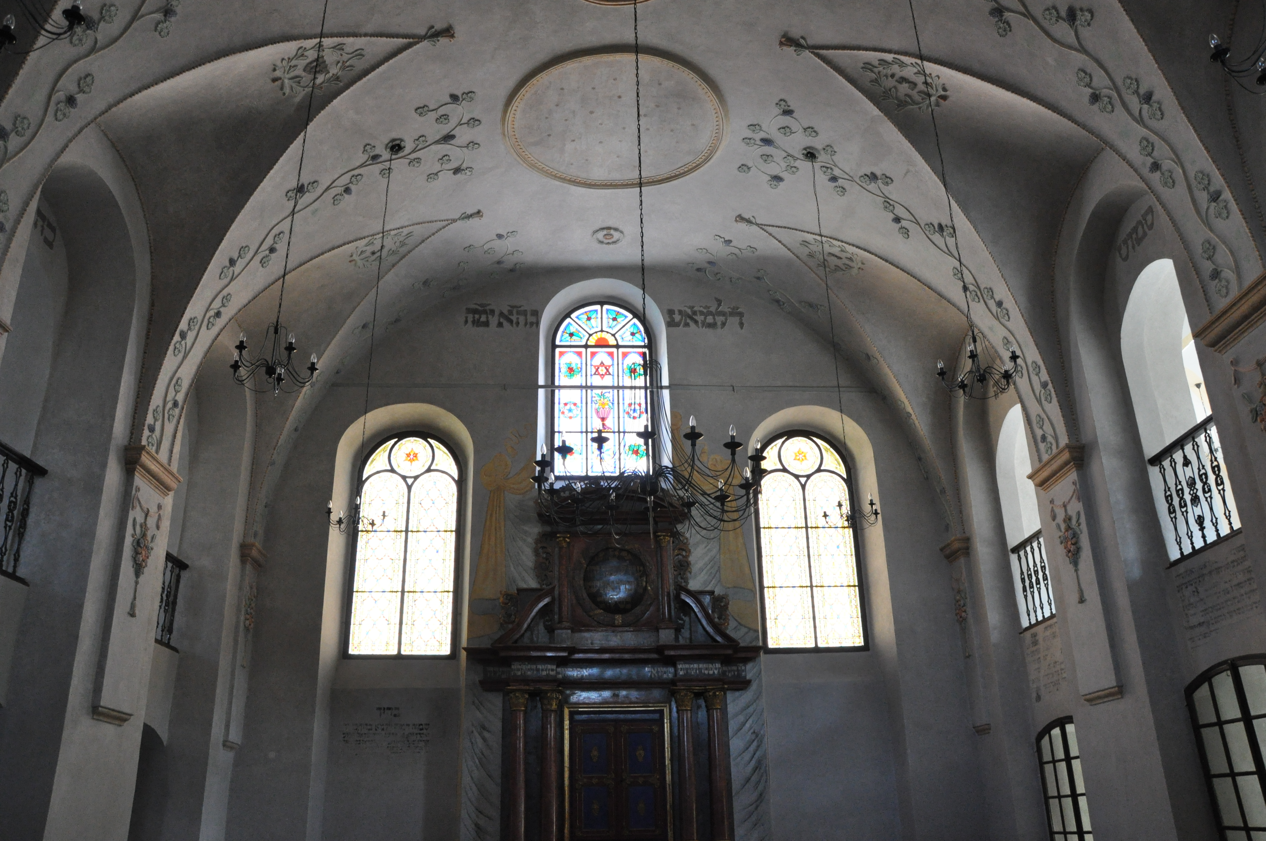 Synagogue in Kolín